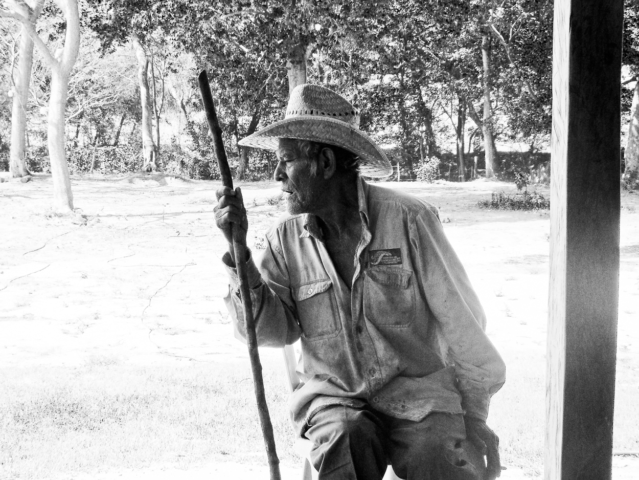 En el ejido Cuauhtémoc (34)